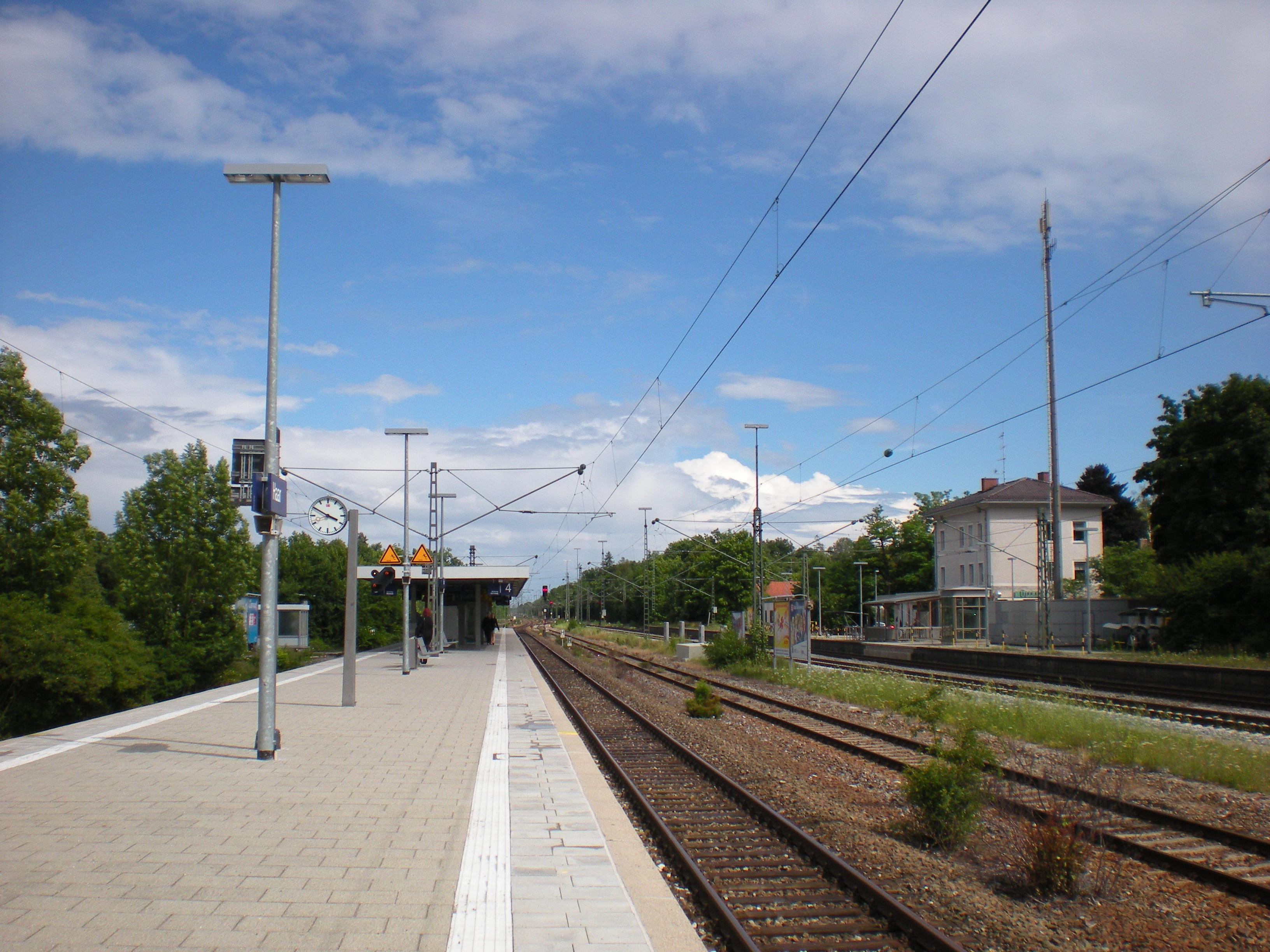 S-Bahnsteig, Fernbahngleise und Bahnhofsgebäude des Bahnhofs Haar